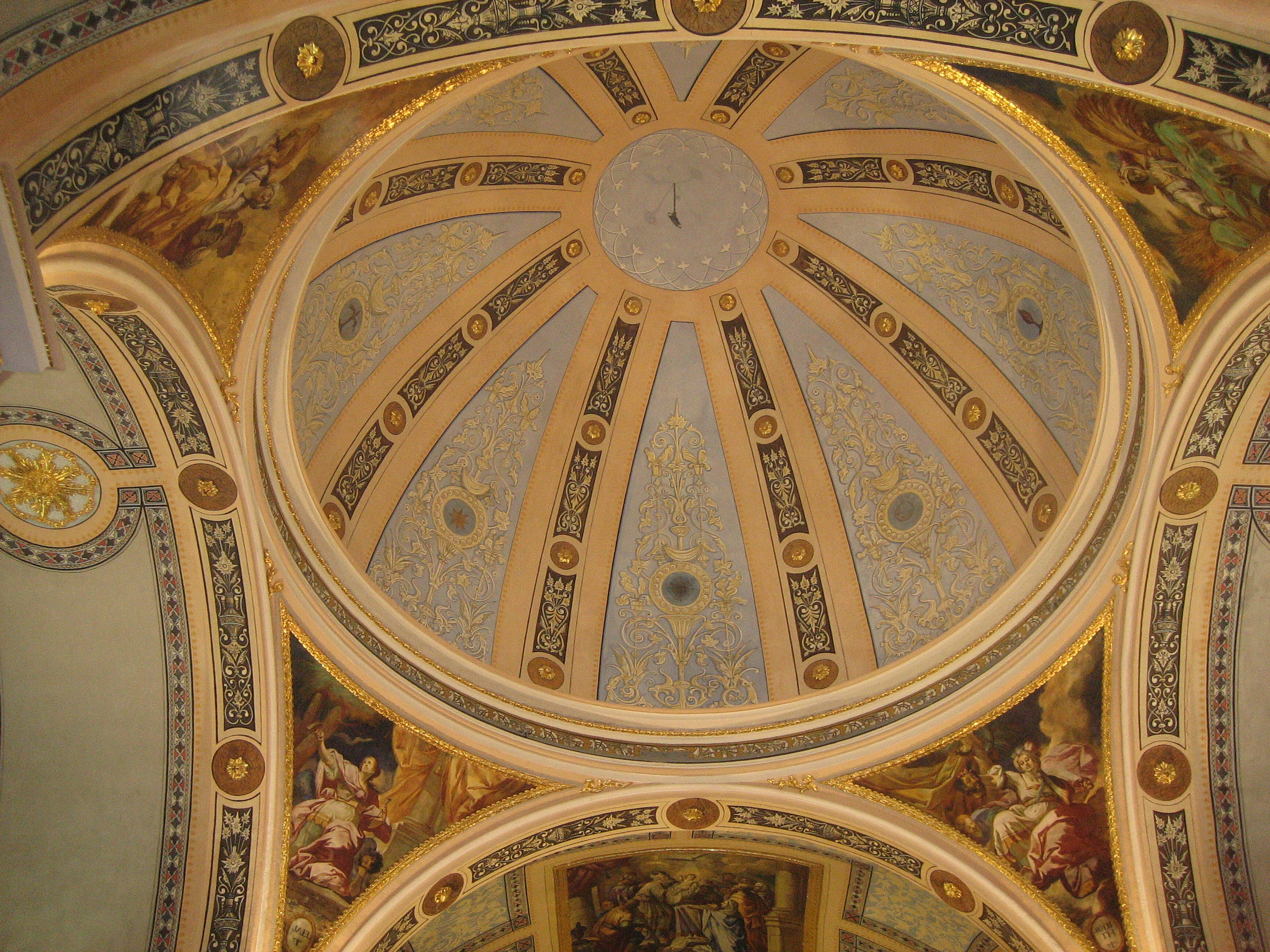 Cúpula del creuer de l'ermita de la Mare de Déu de la Misericòrdia i Sant Sebastià de Vinaròs (Baix Maestrat)